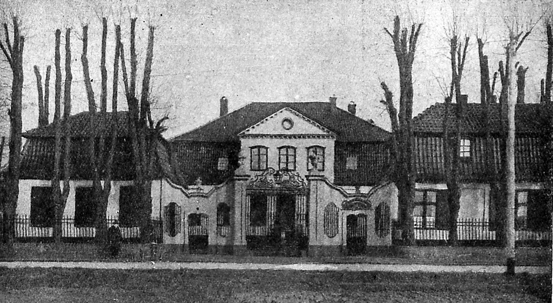 Die erneuerte Gitteranlage beim Gartenhaus Bellevue. Besitzer W. Brügmann & Sohn